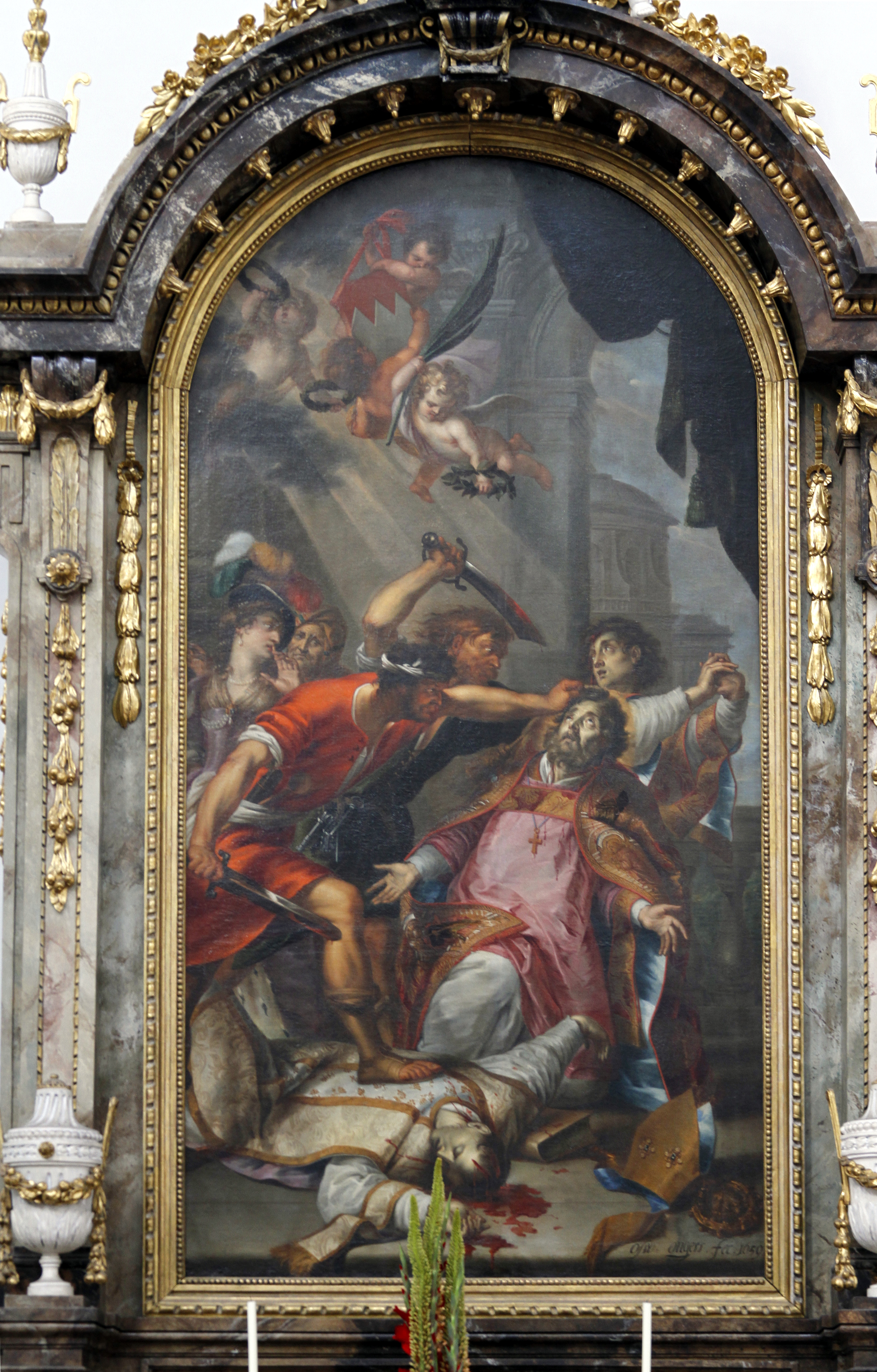 Neumünster - Würzburg - Germany